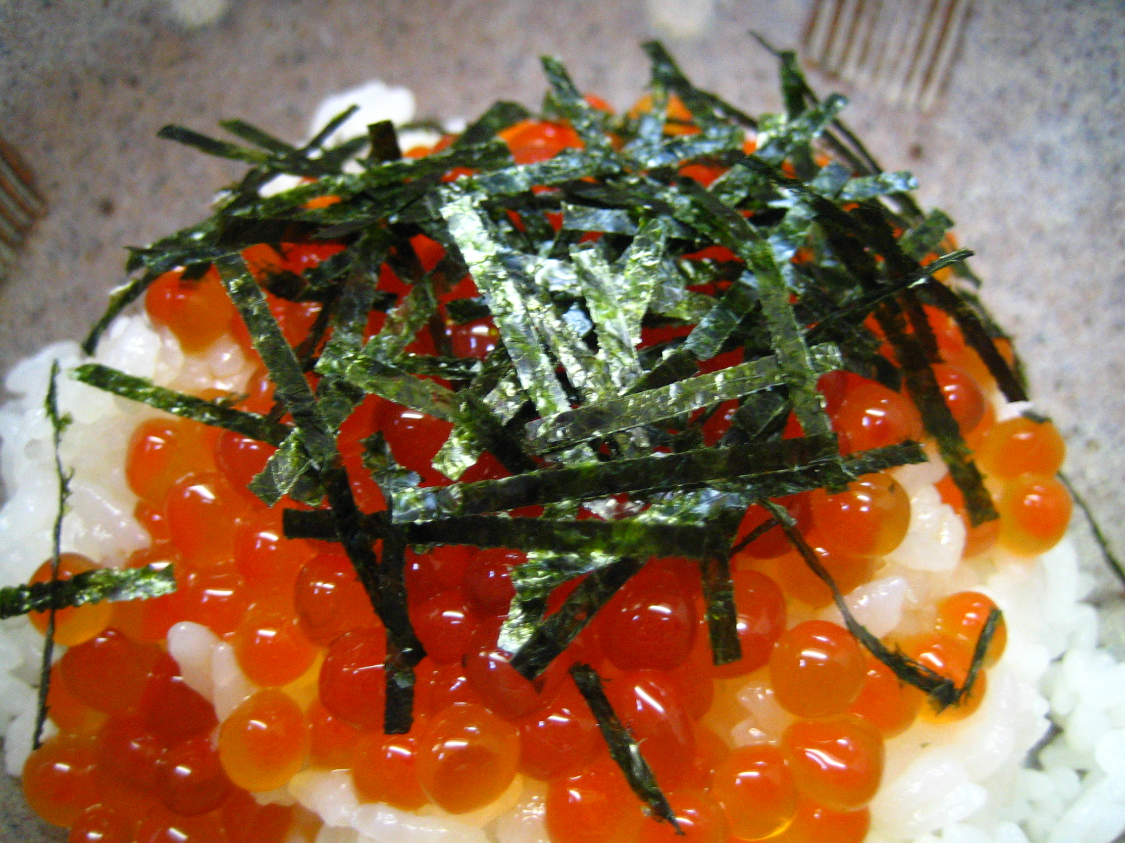 at Uotake, an izakaya in Tsukiji, Tokyo